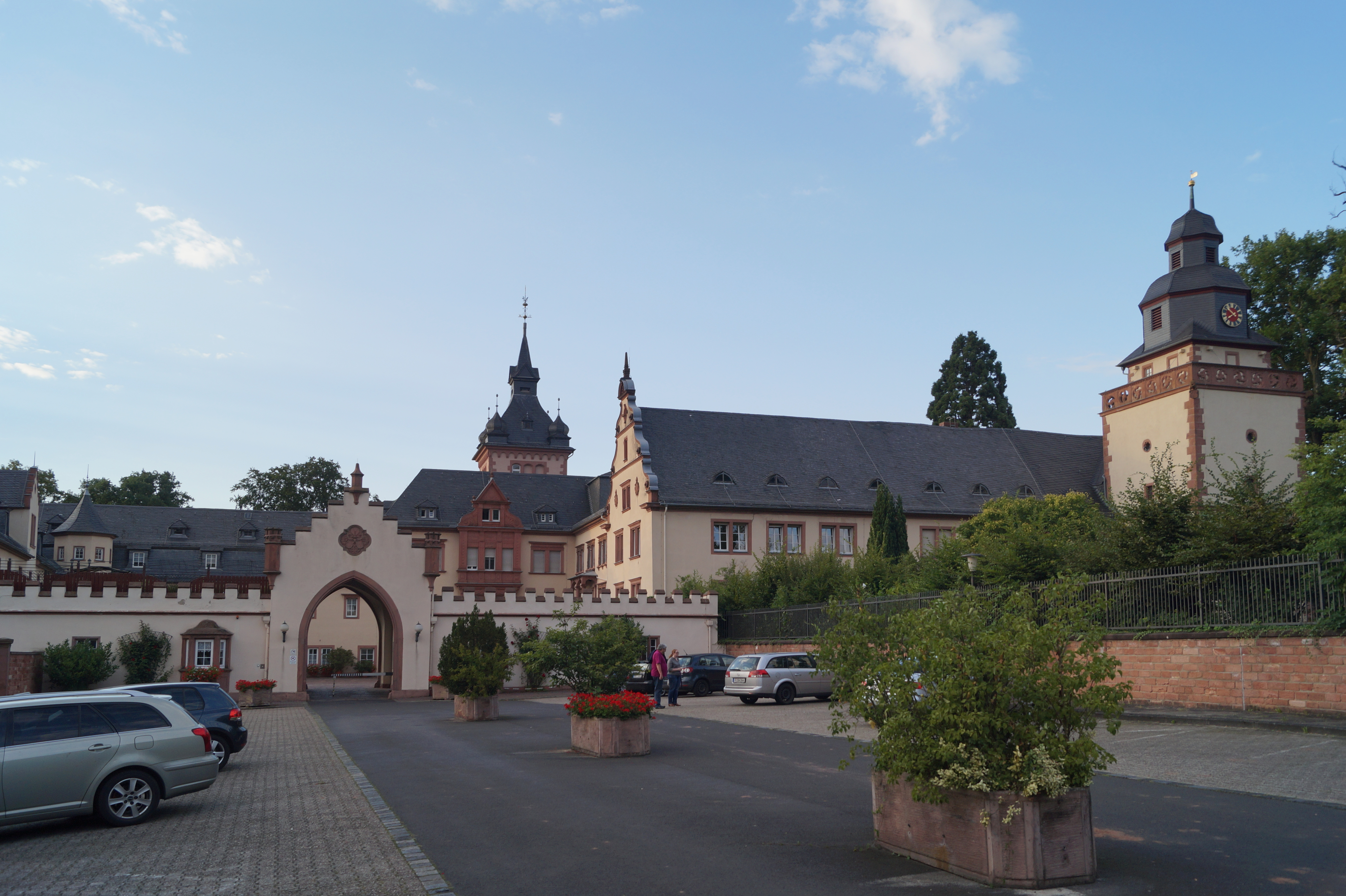 Schloss Meerholz, Stadt Gelnhausen, Ansicht von Süden